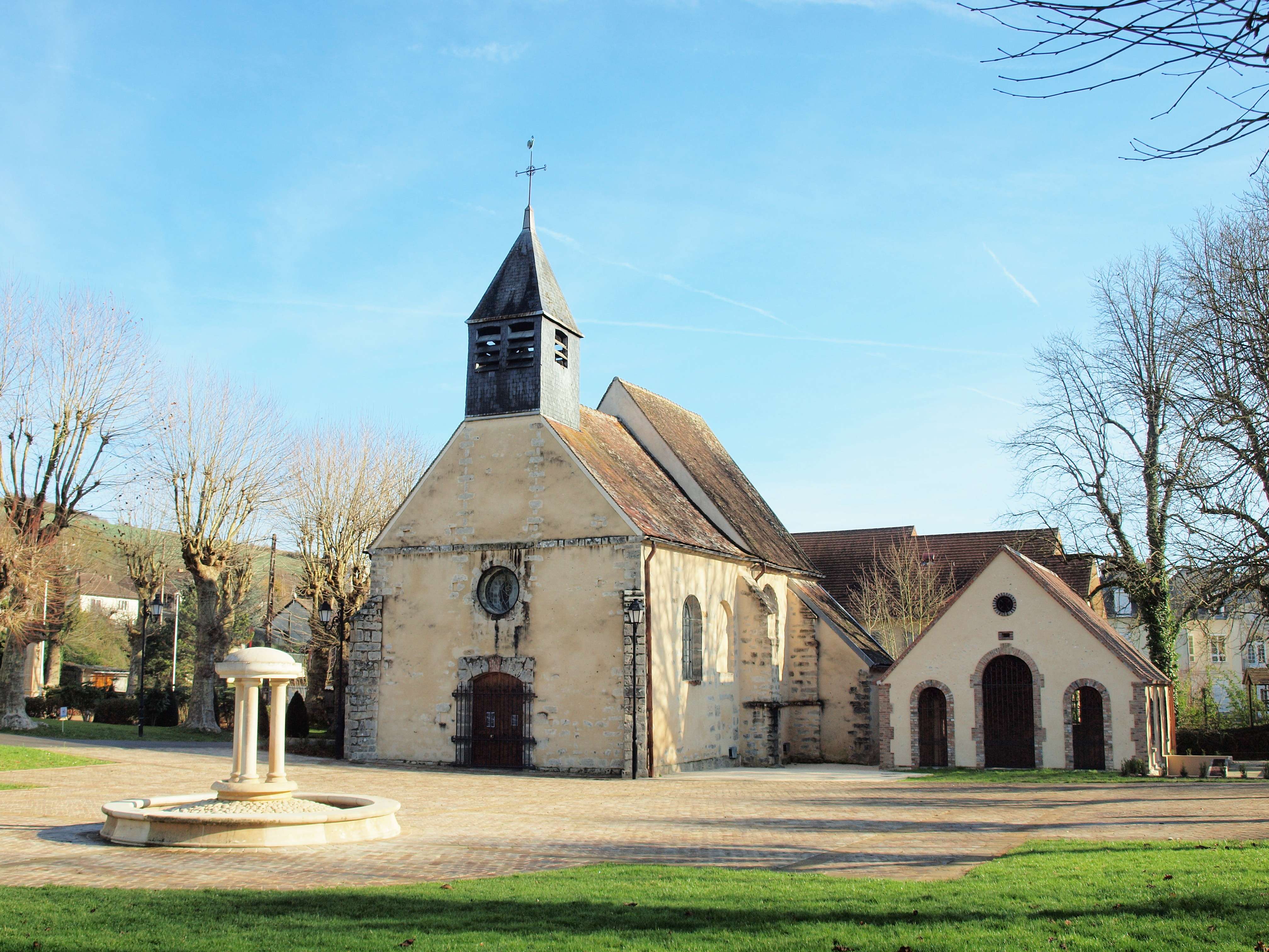 Paron (Yonne, France)